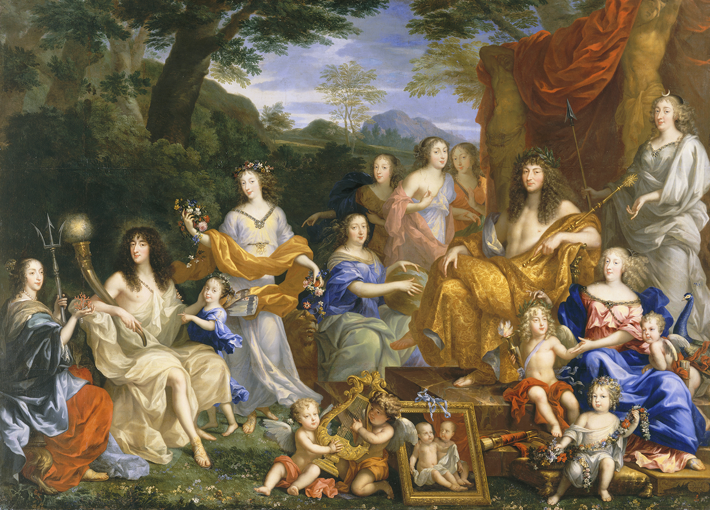 Em sentido horário: Henriqueta de França como Anfitrite, Filipe d'Orleães como a Estrela da Manhã, Maria Luísa como Íris, Henriqueta de Inglaterra como Flora, Ana d' Áustria como Cibele, as filhas de Gastão d'Orleães (Francisca Madalena, Margarida Luísa e Isabel) como as Graças, Luís XIV como Apolo, o Delfim como Himeneu, Maria Teresa como Juno, Madame Real, Filipe Carlos como Cupido e a Grande Mademoiselle como Diana.